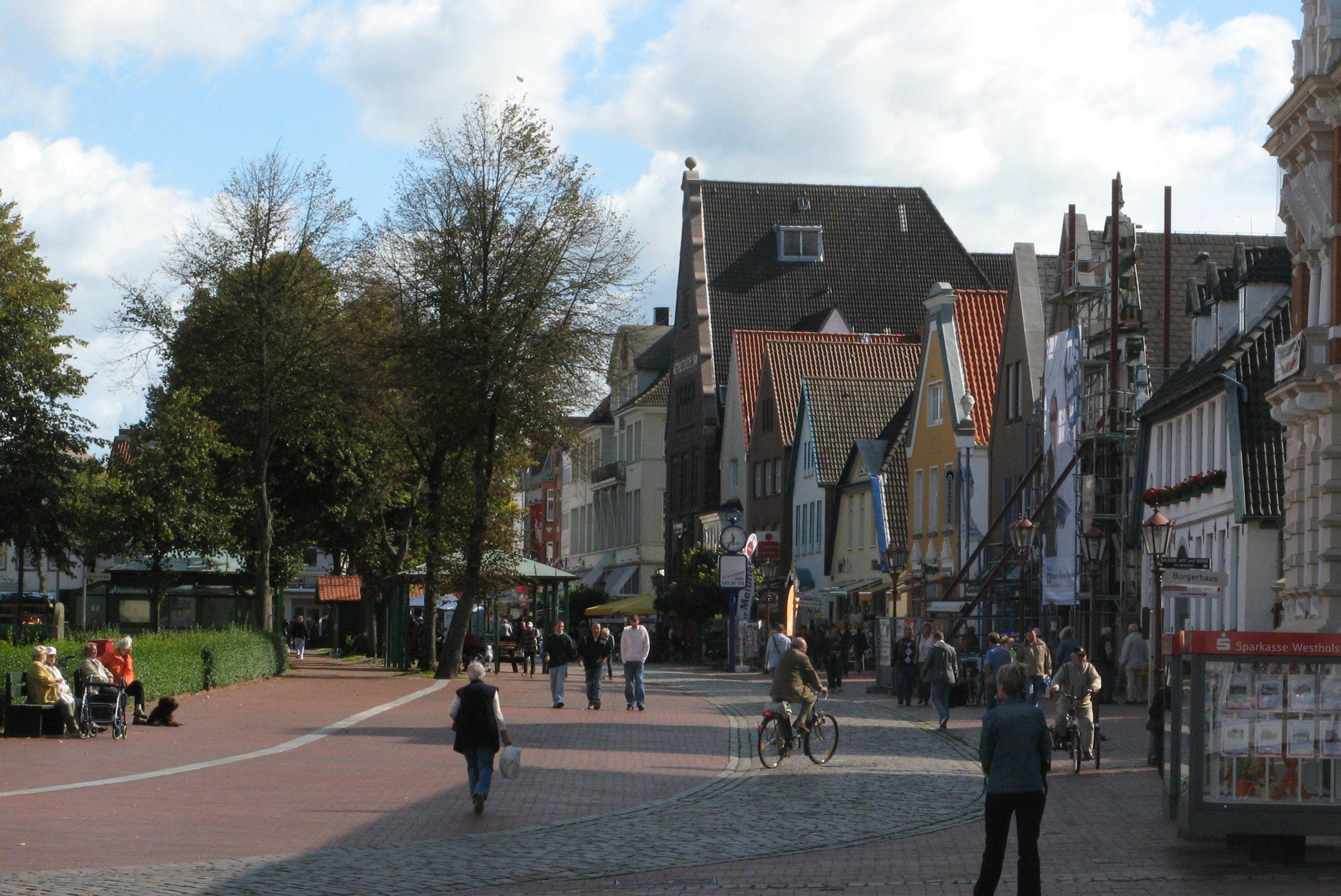 Part of Market place in Heide, Holstein